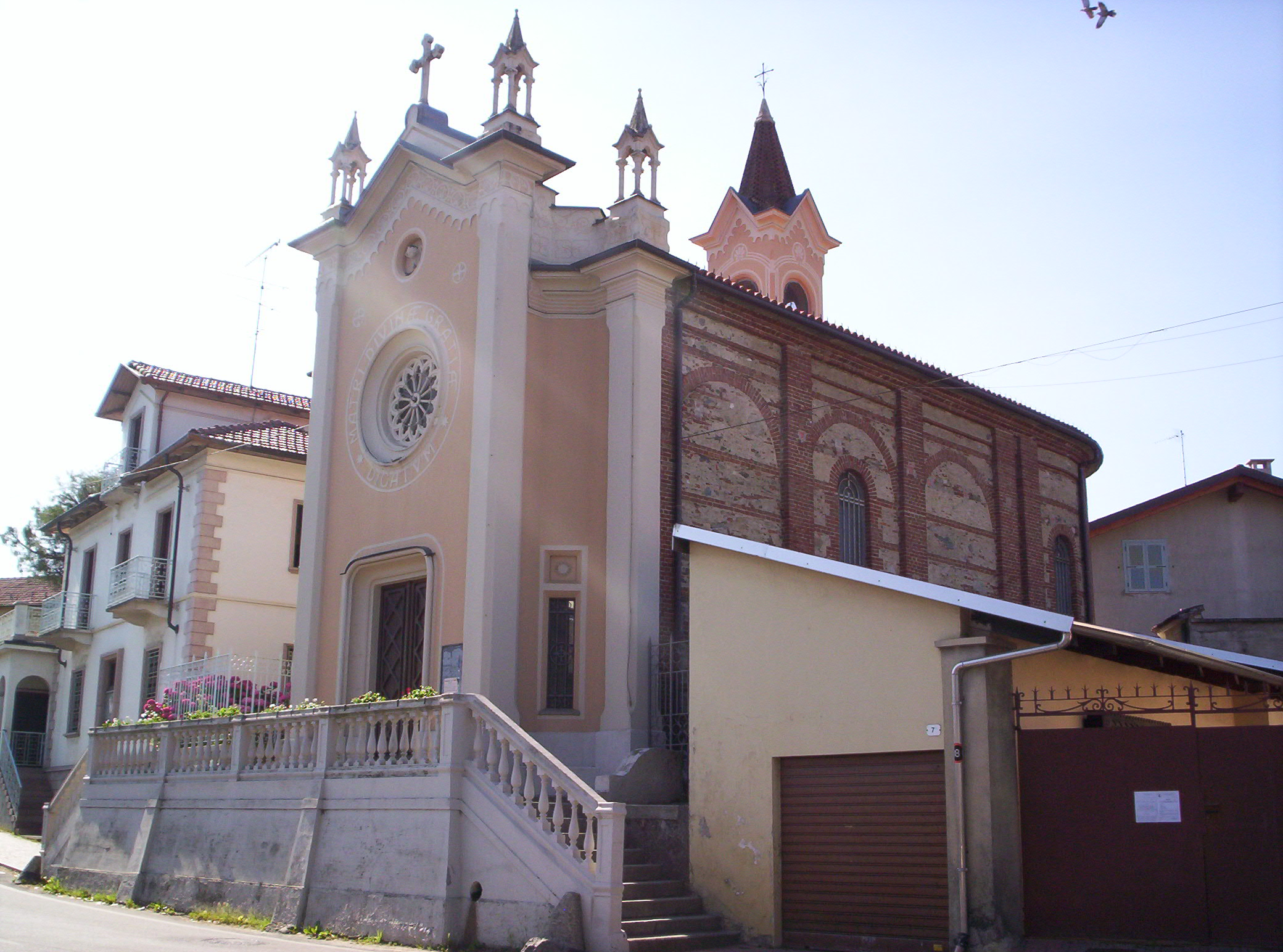 == Licenza d'uso: ==